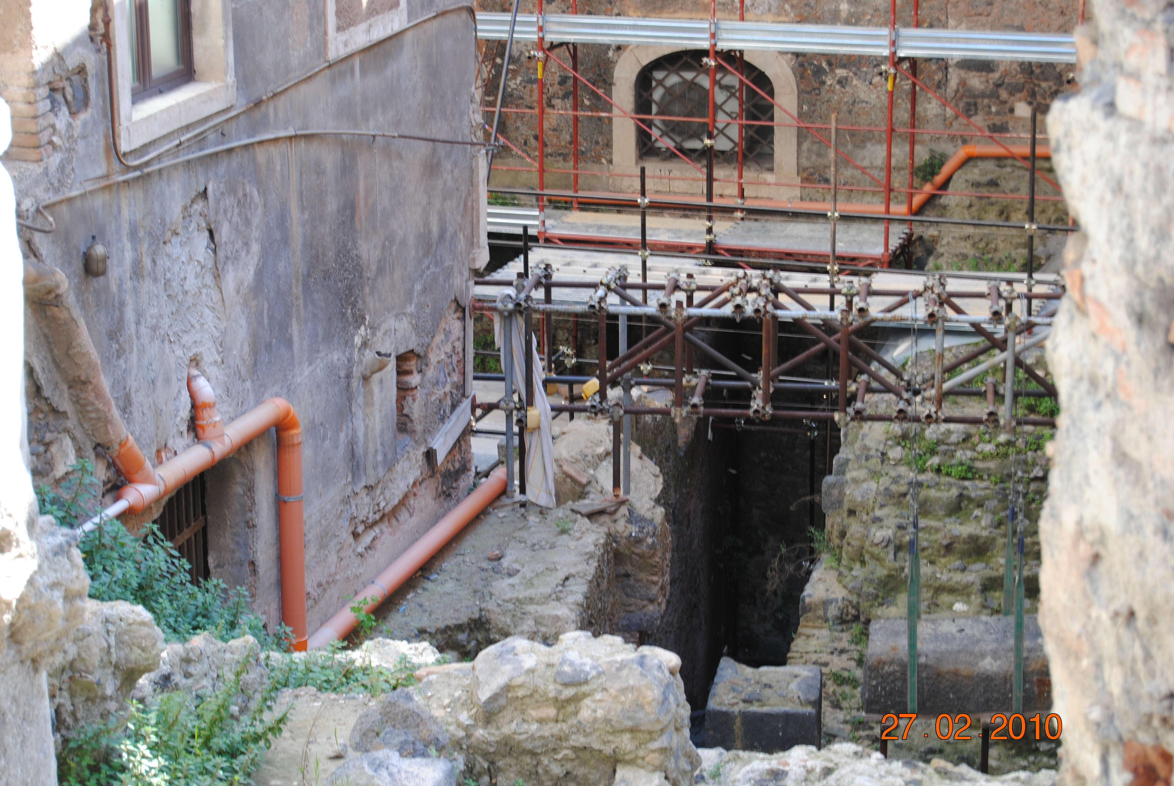 Trincea di scavo di Ignazio Paternò Castello Principe di Biscari, nel settore orientale adiacente al Teatro romano di Catania. In basso si scorge l'antico ingresso trabeato, mentre a lato la rampa d'accesso all'edificio. Di fronte è il palazzo Gravina-Cruyllas, mentre a sinistra si intravedono le fondamenta del palazzo dei principi Valsavoja.